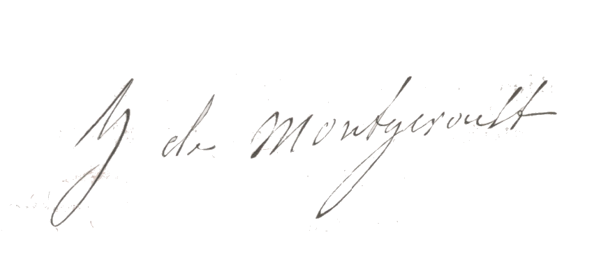 Signature d'Hélène de Montgeroult (1764–1836)